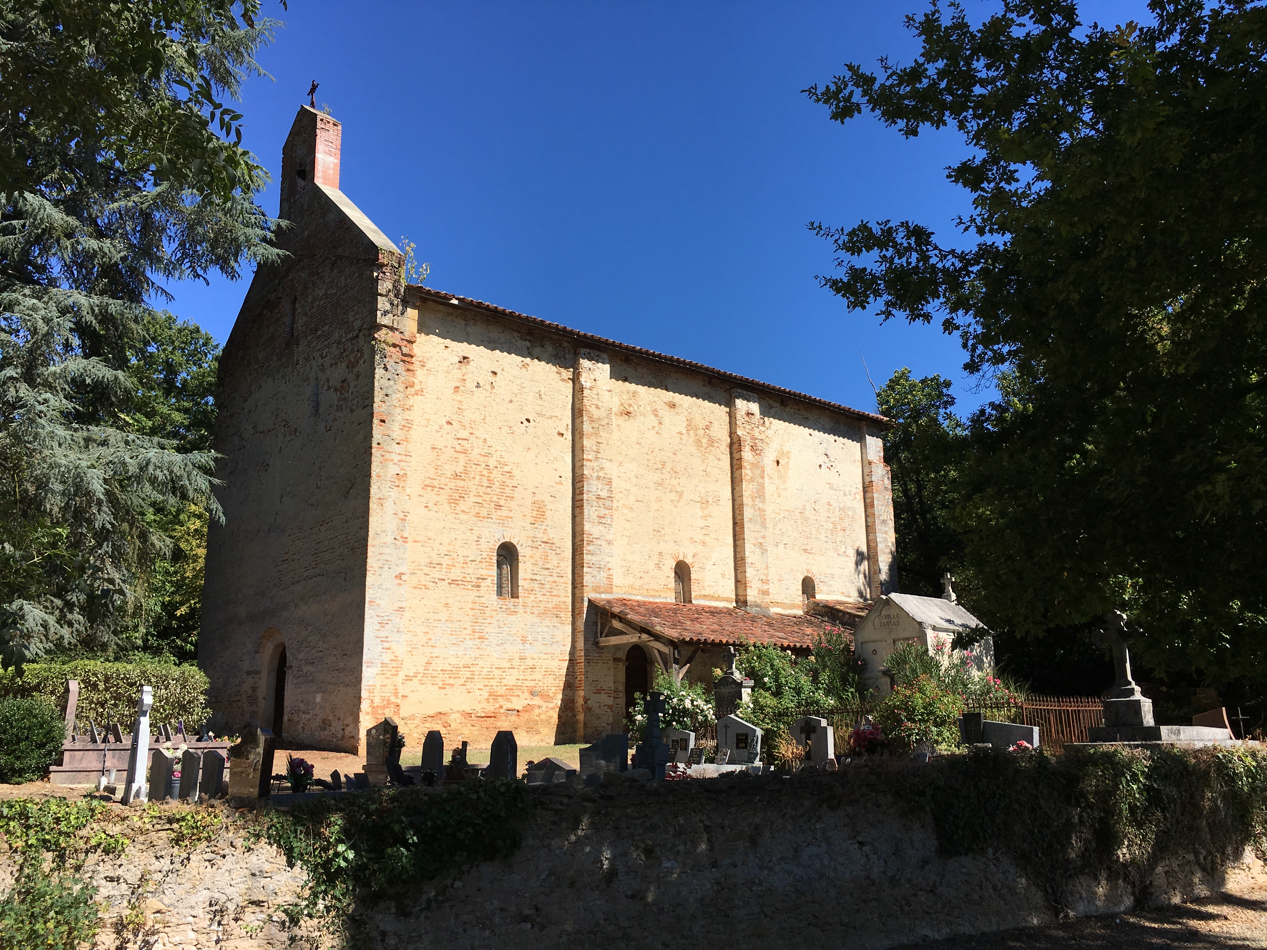 Chapelle de l’Hôpital (XIIᵉ siècle), vestige la commanderie de l’Hôpital-Sainte-Christie, située en bordure de la Via Podiensis (chemin allant du Puy-en-Velay à Saint-Jacques-de-Compostelle), sur la commune de Cravencères dans le Gers. Vue de la façade sud, avec l'entrée et le cimetière.